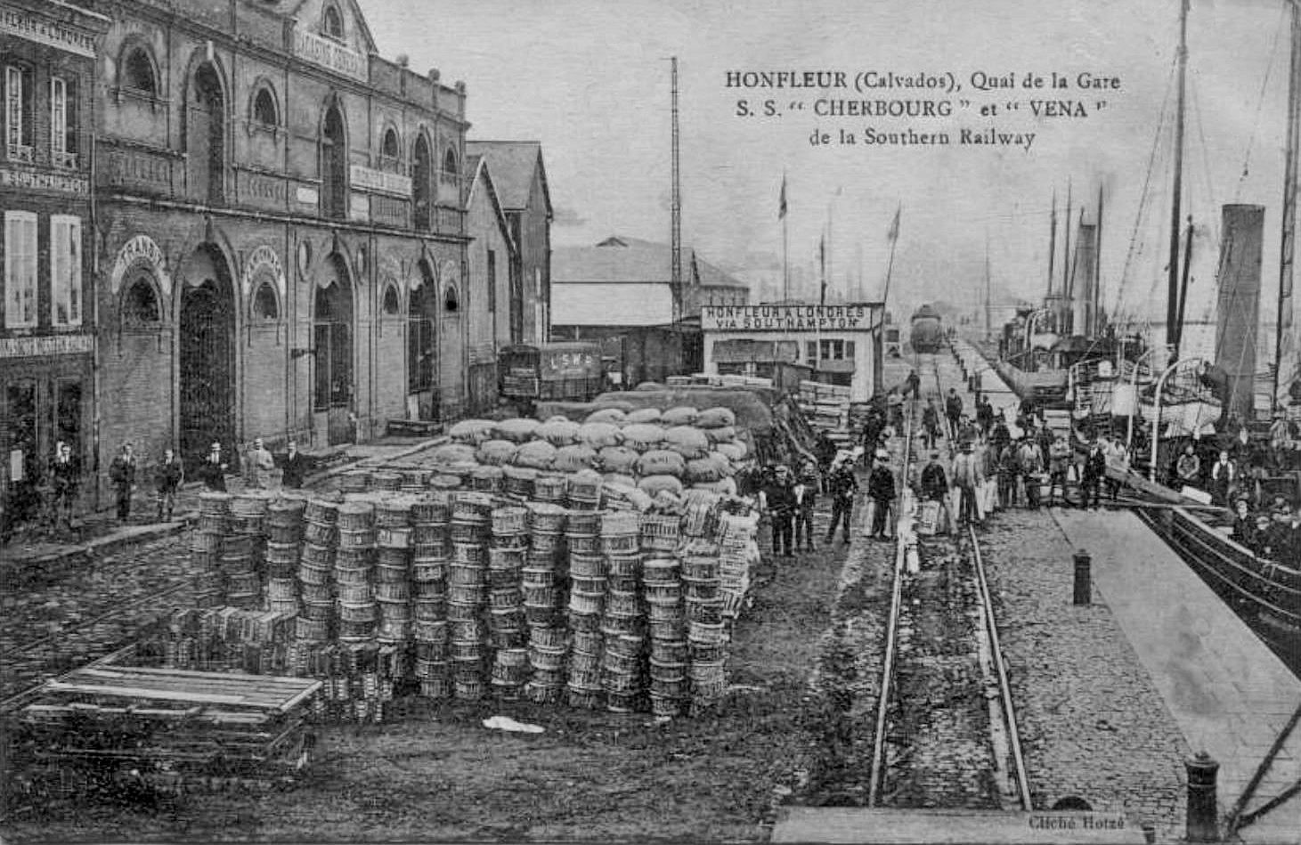 Le quai de la Gare à Honfleur avec une voie et un train sur le quai.